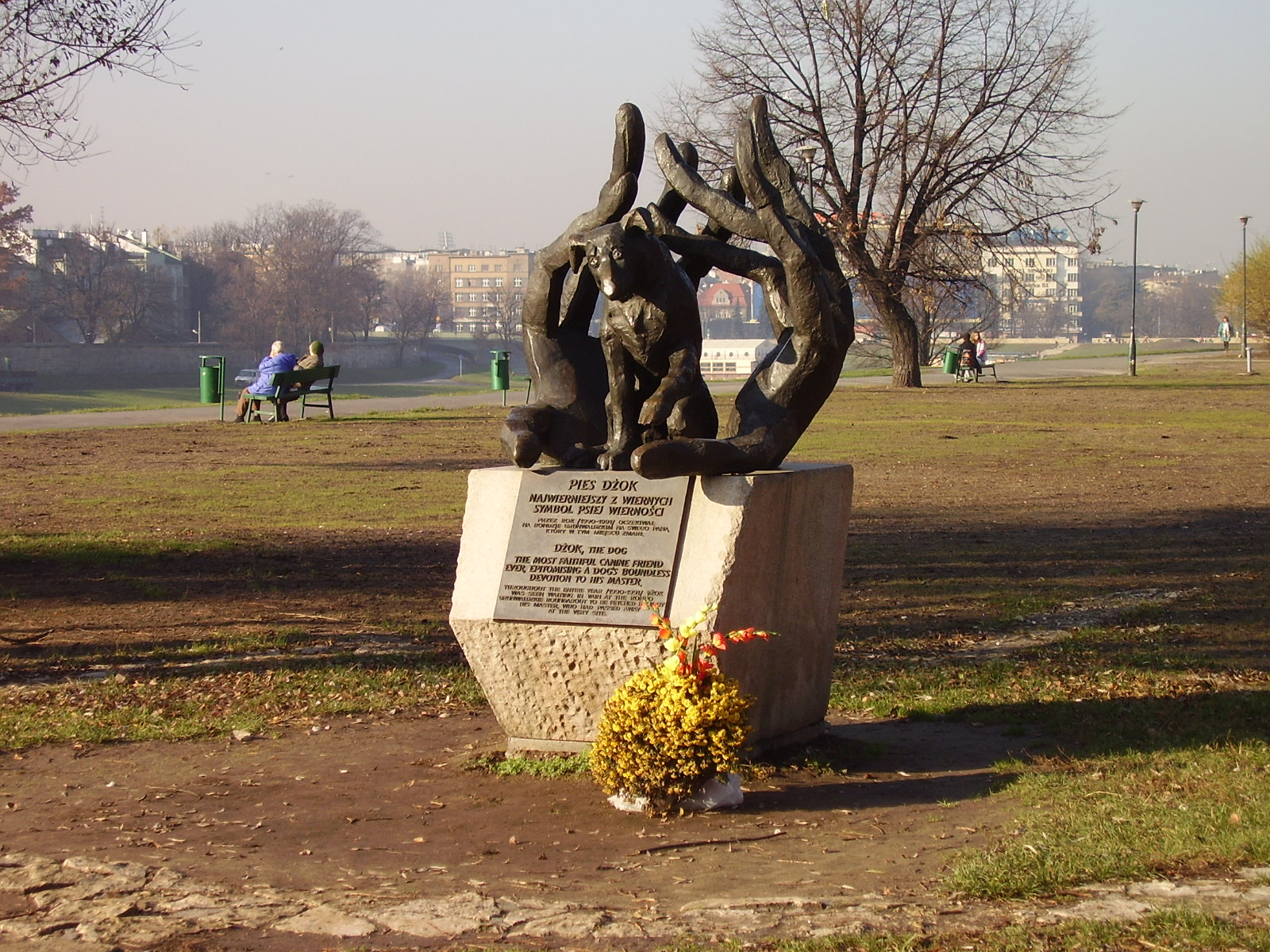 Krakow